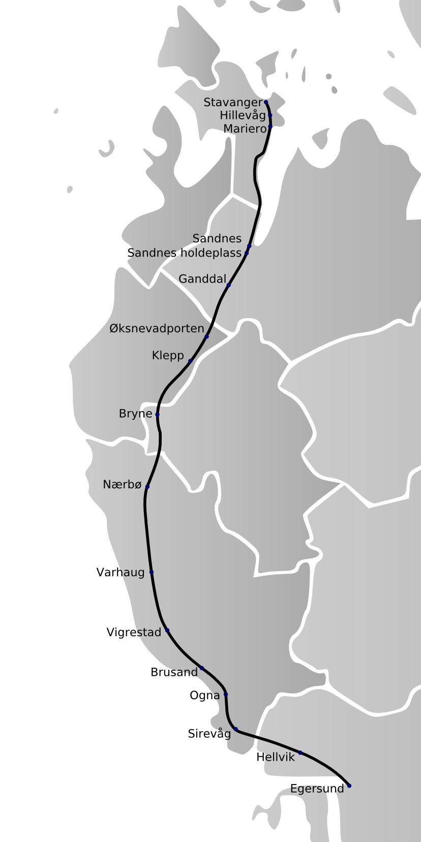 Jærbanen tegnet inn på kommunekart over Rogaland.